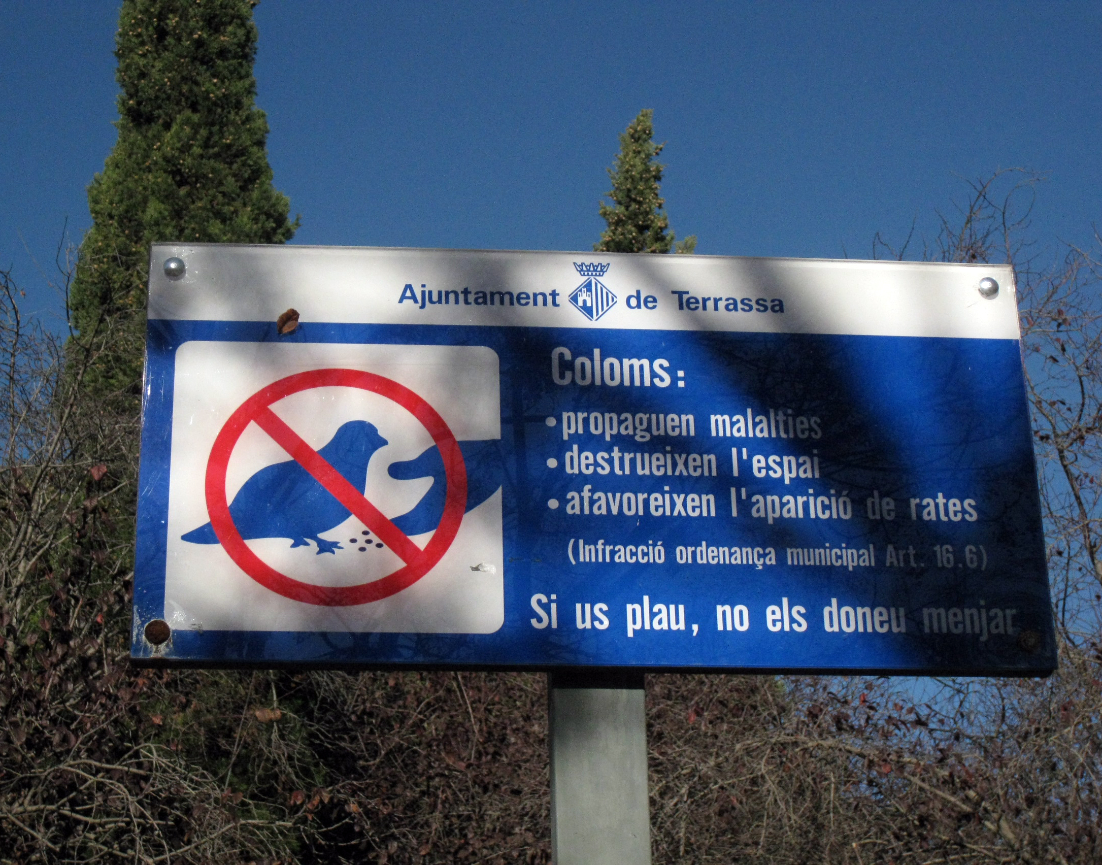 Advertiment de no donar menjar als coloms, a la plaça de l'Assemblea de Catalunya (Terrassa)